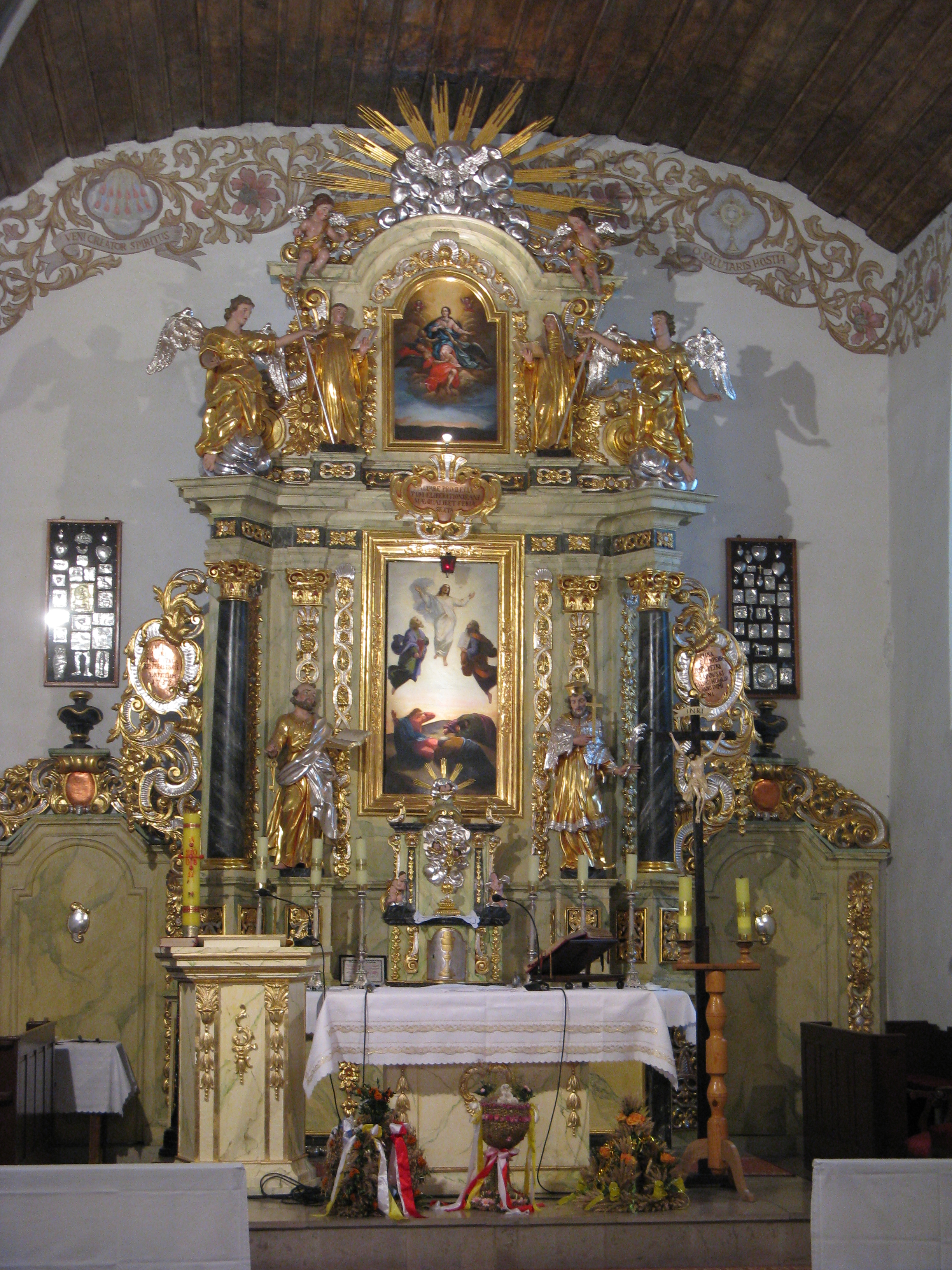 Ołtarz główny w kościele w Dźwierznie